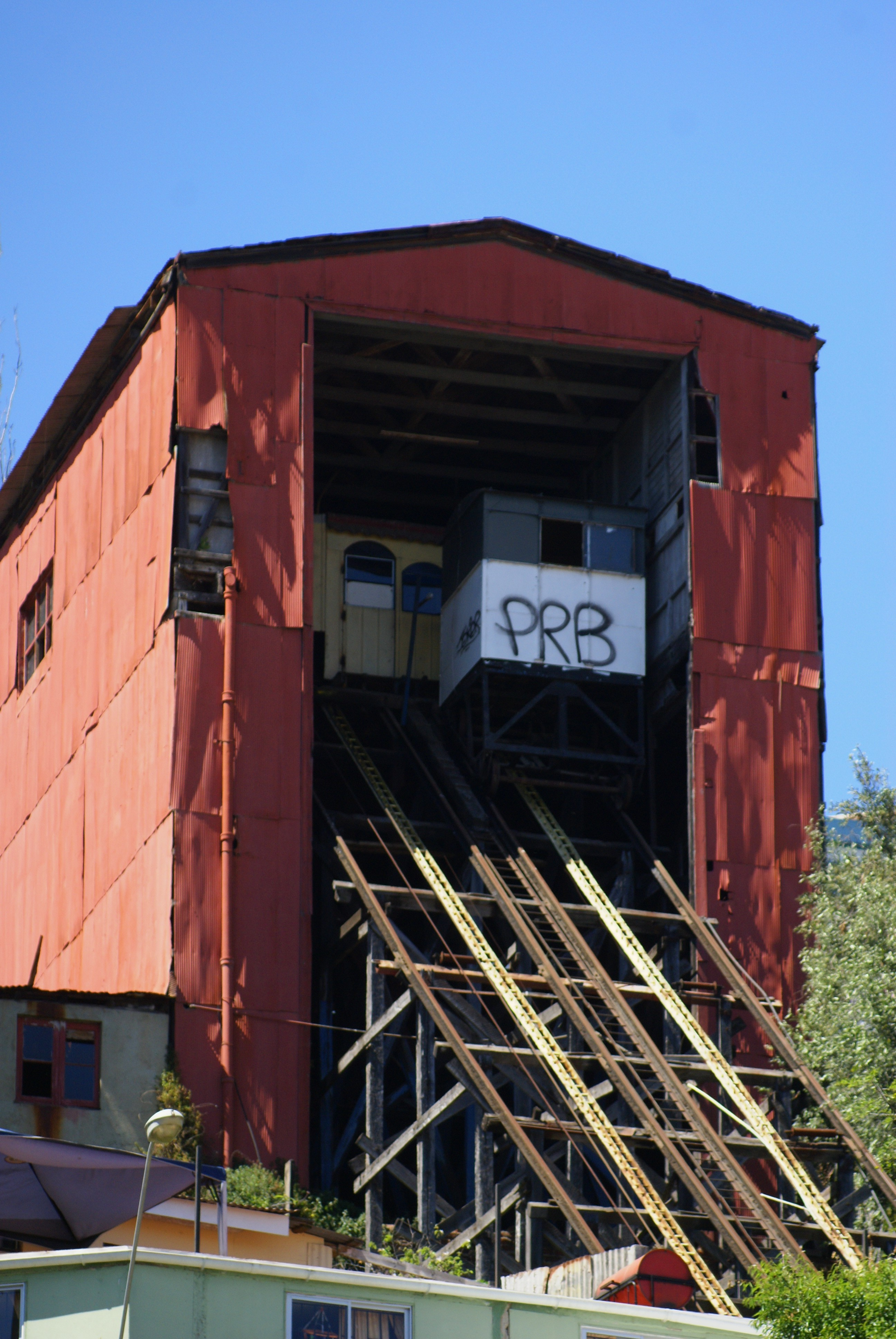 Ascensor Larraín This is a photo of a national monument in Chile: 776